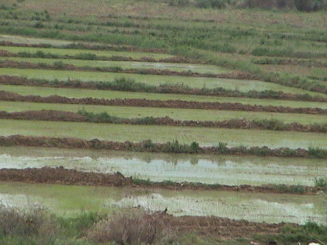 Rice fields in Kumçelteği, Çorum, Turkey